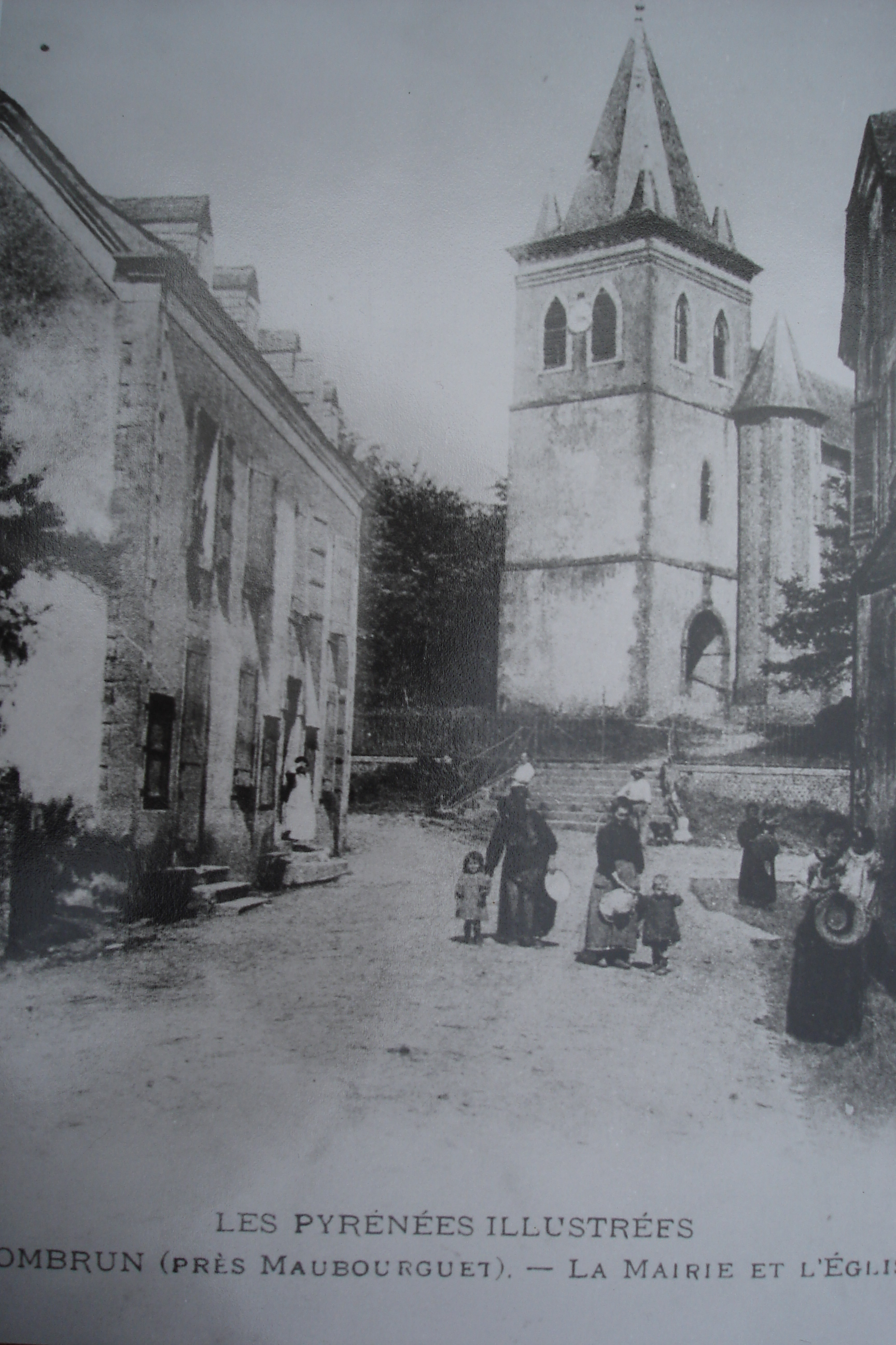 Eglise et mairie de Sombrun, carte postale du début du 20ième siècle. Sombrun. Hautes-Pyrénées . France.